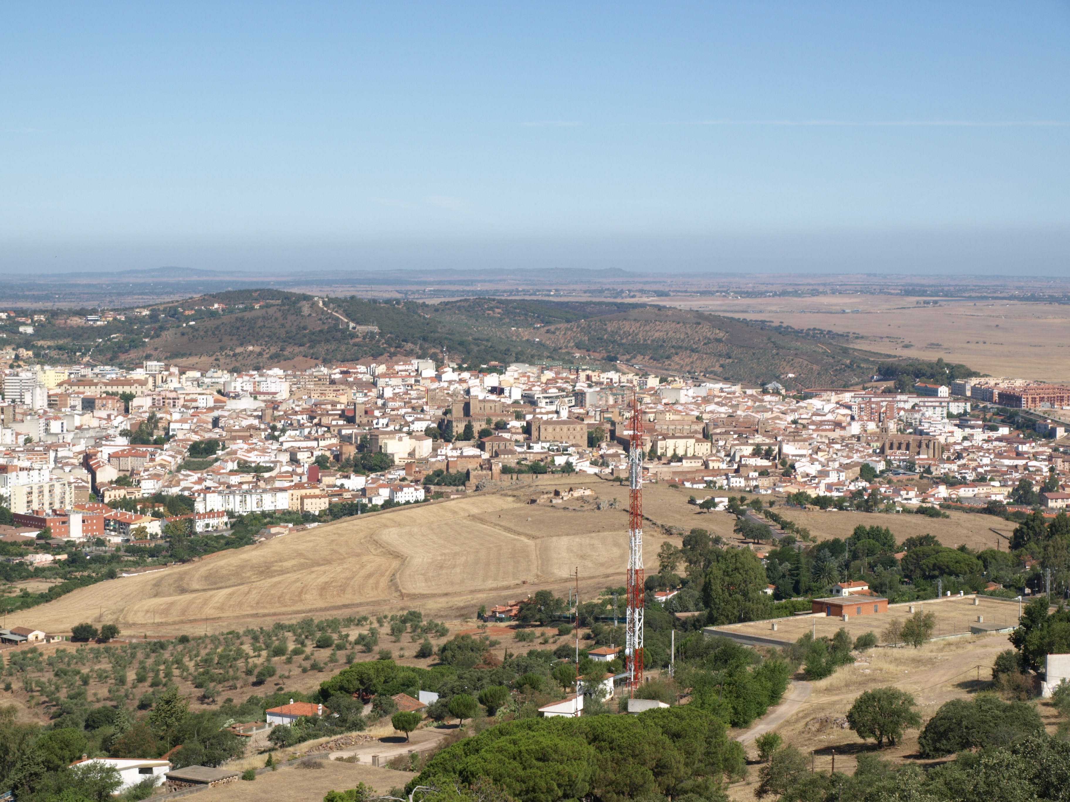 Cáceres - Vista general (desde el Santuario de la Montaña)